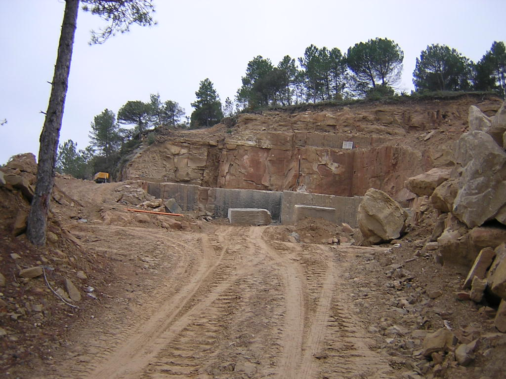 Pedrera d'en Sala (Monistrol de Calders, Moians)